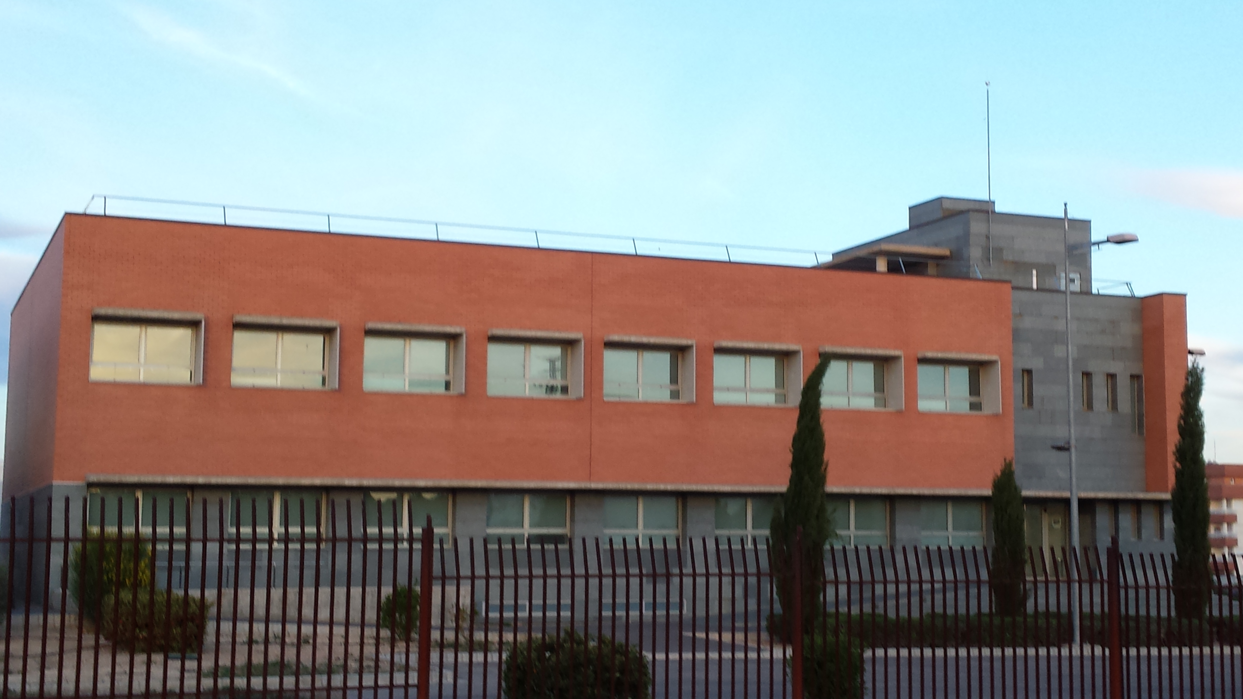 Entrada al Instituto de investigación en Discapacidades Neurológicas (IDINE) y al Centro Regional de Investigaciones Biomédicas (CRIB)